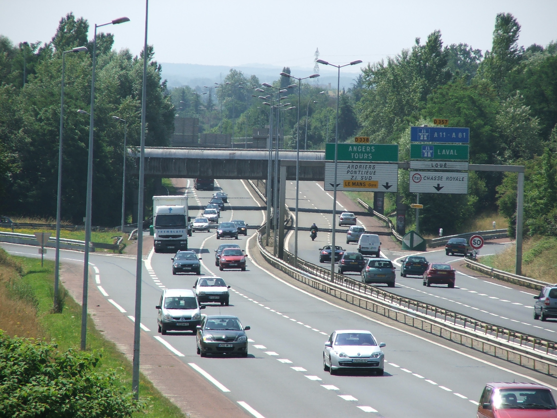 La rocade du Mans depuis la butte du centre hospitalier au nord de la ville.